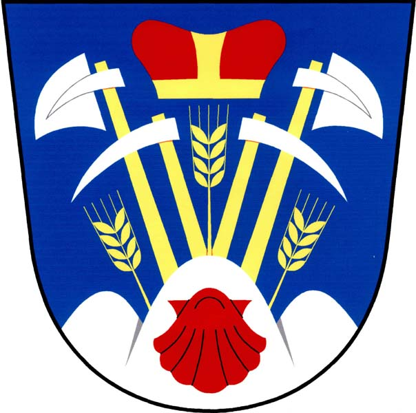 Znak obce Rohozná (okres Jihlava)